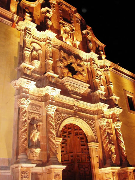 Templo de Santo Domingo